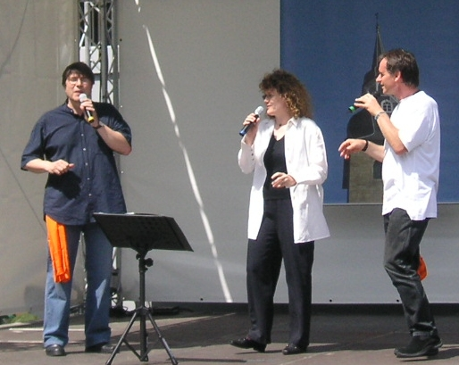 Helmut Krüger, Birgit Kley und Jonathan Böttcher bei einem Open Air Konzert anlässlich des 31. Deutschen Evangelischen Kirchentages vor dem Hauptbahnhof in Köln am 6.6.2007